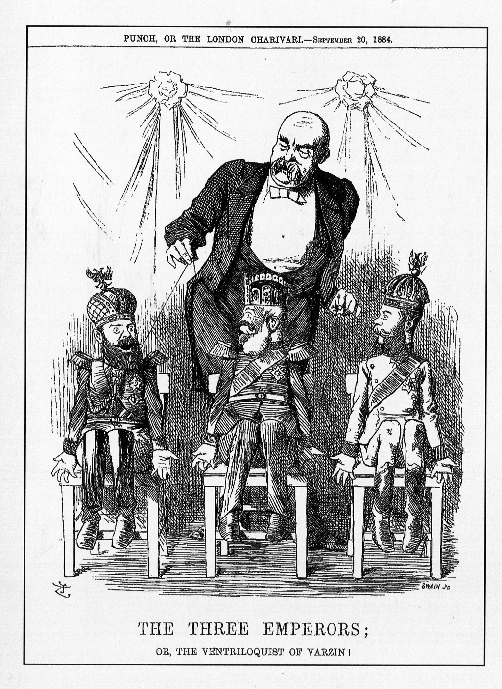 Бисмарк-кукловод